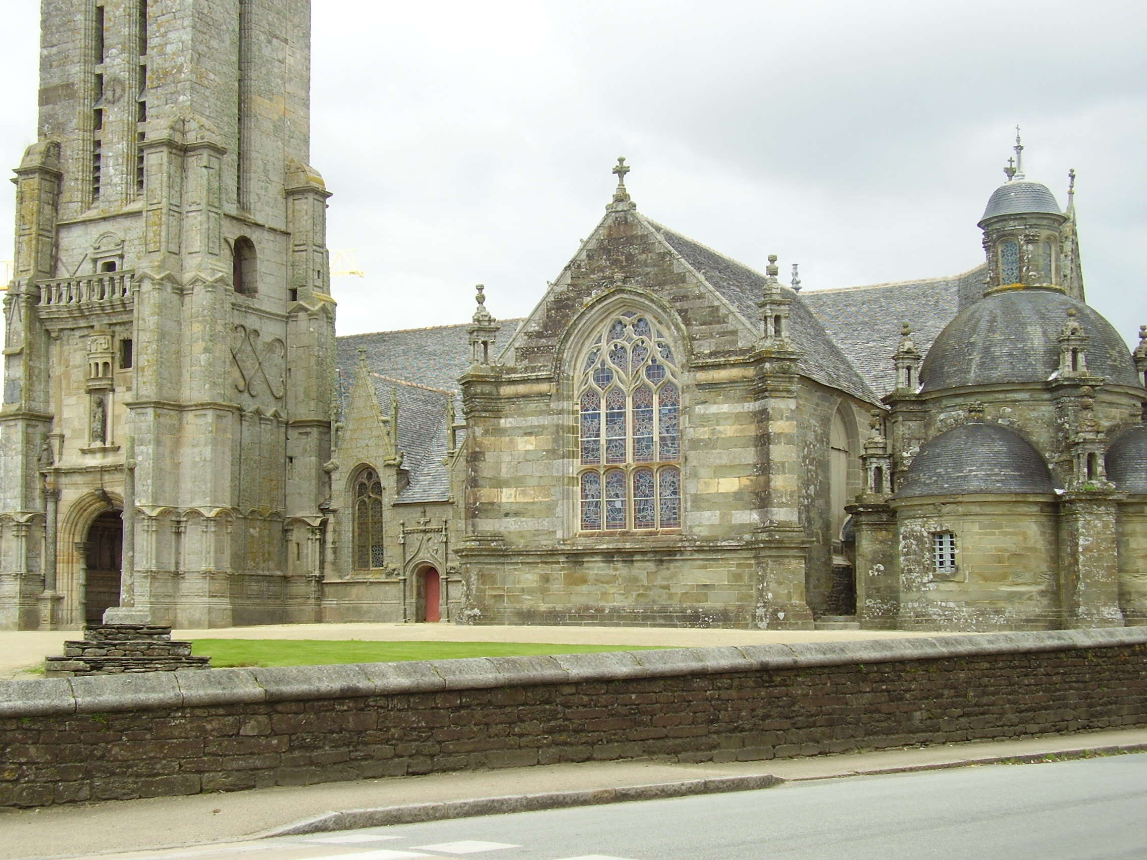 Pleyben, Pfarrbezirk mit monumentaler Calvaire und Kirche, Frankreich; Calvaire